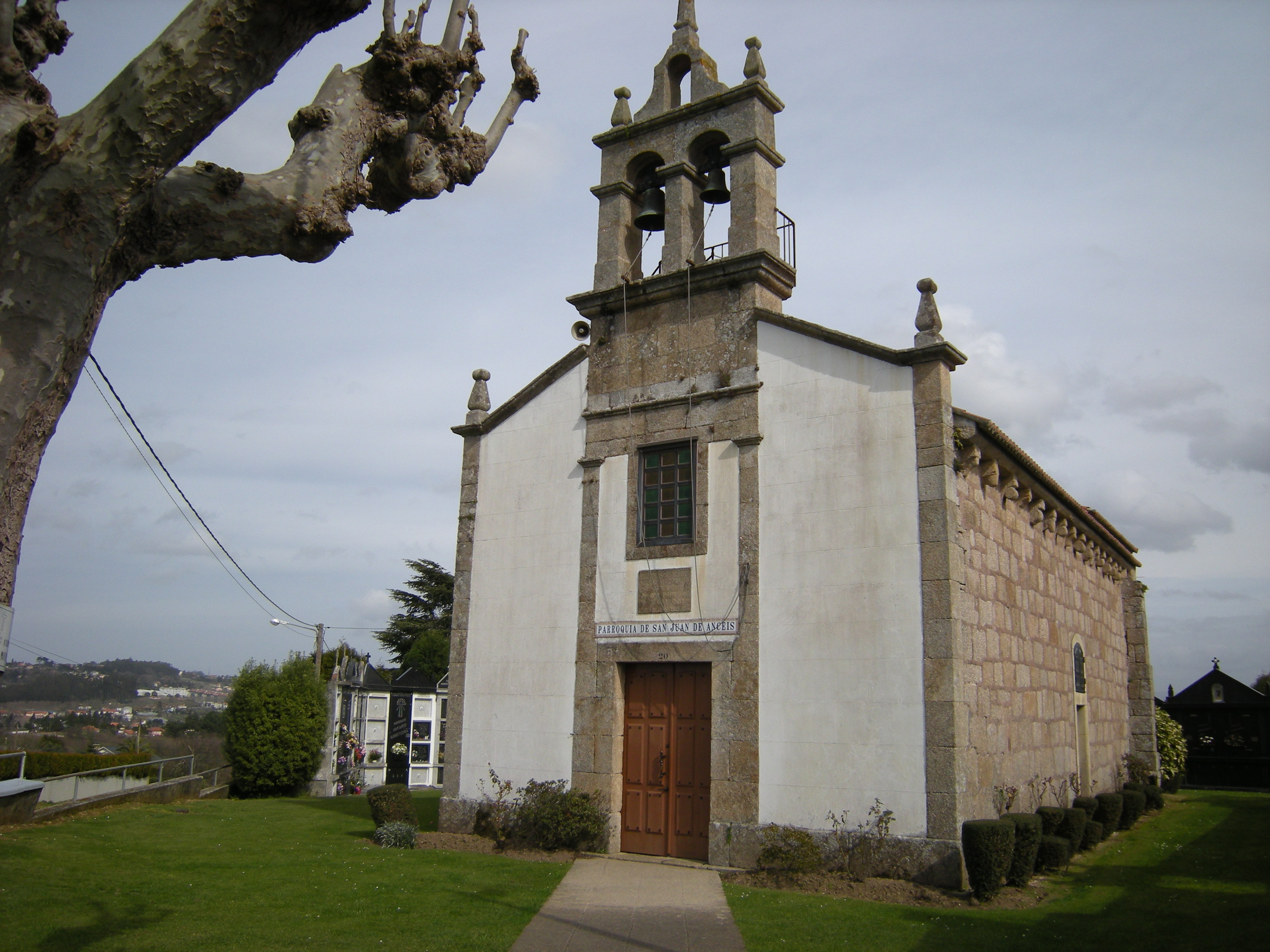 Iglesia románica construida en el siglo XII, que sufre reformas posteriores en su frontal y cabecera.